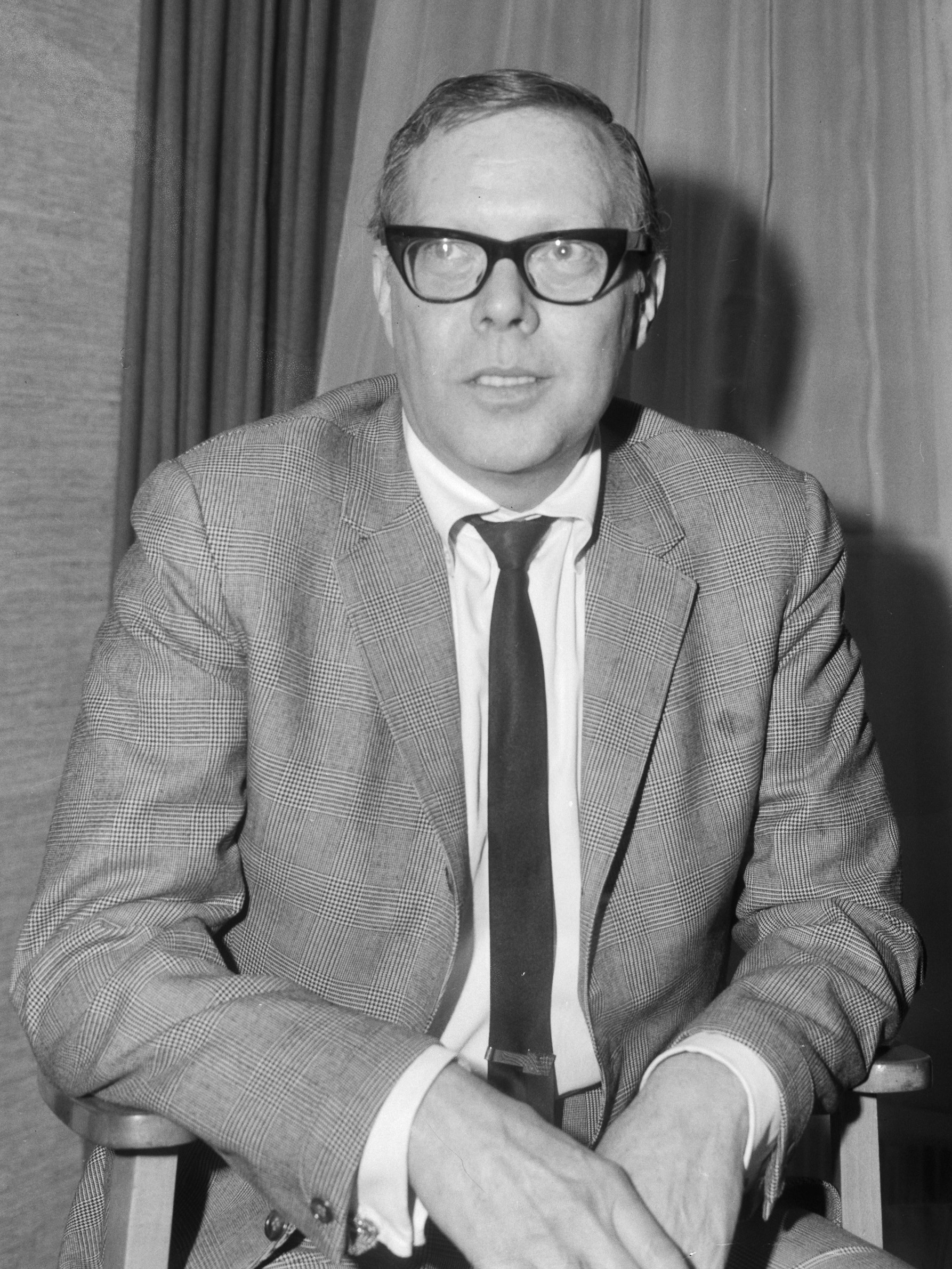 Persconferentie van Amerikaanse zanger en filmacteur Dick Haymes (kop)